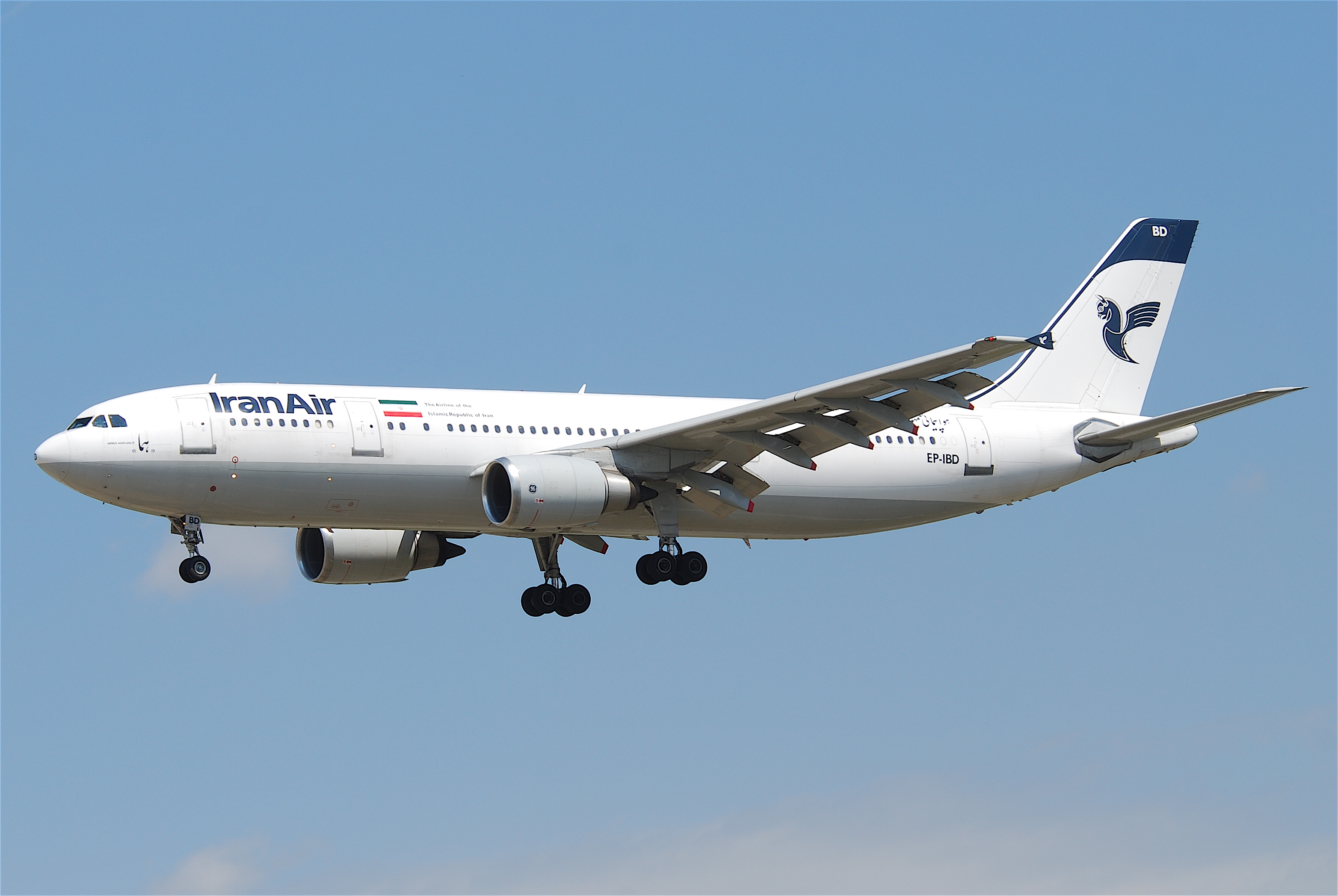 Iran Air Airbus A300-605R; EP-IBD@FRA;06.07.2011/603ks